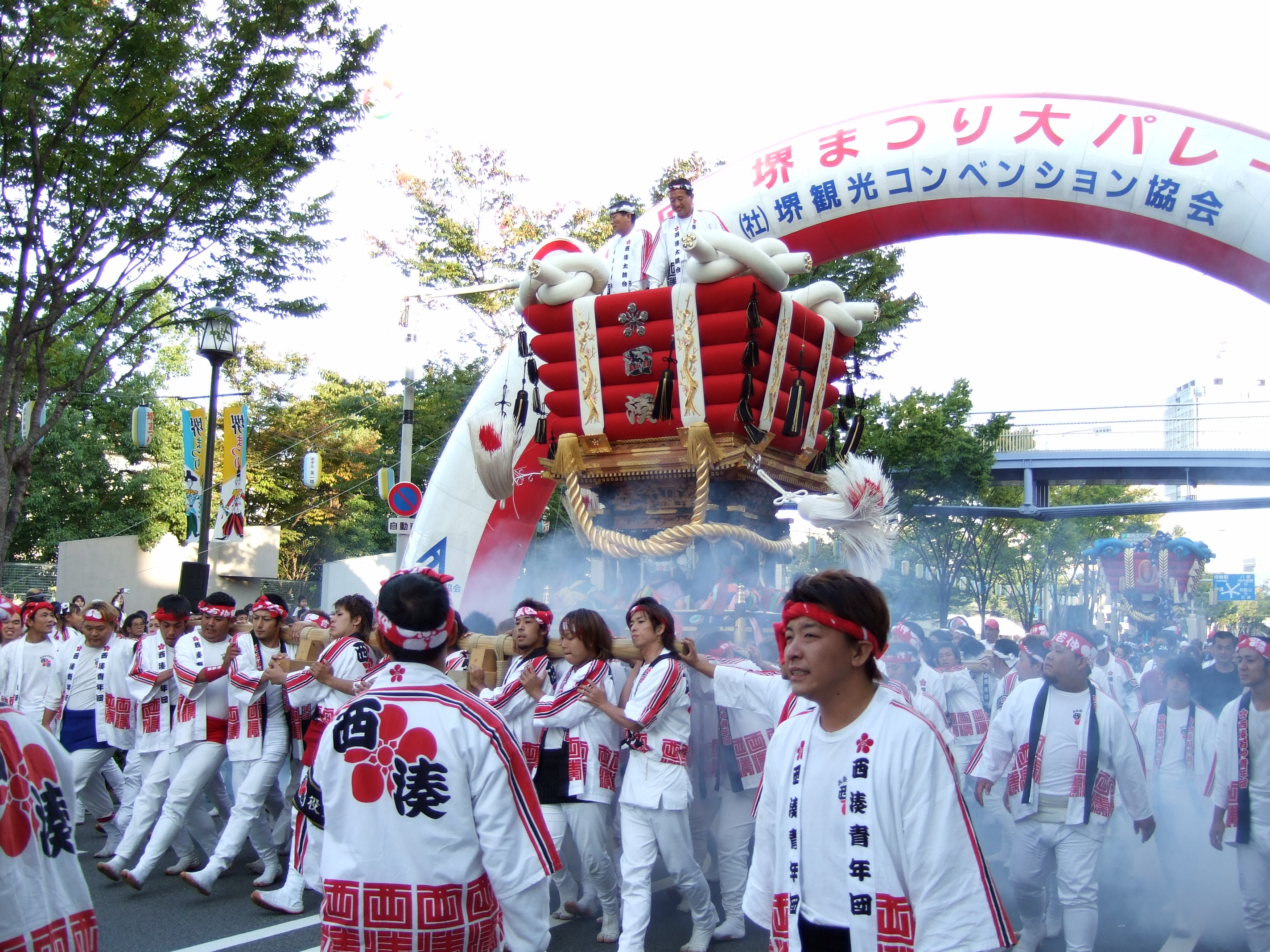 大阪 堺 西湊 ふとん太鼓 2006年堺まつり